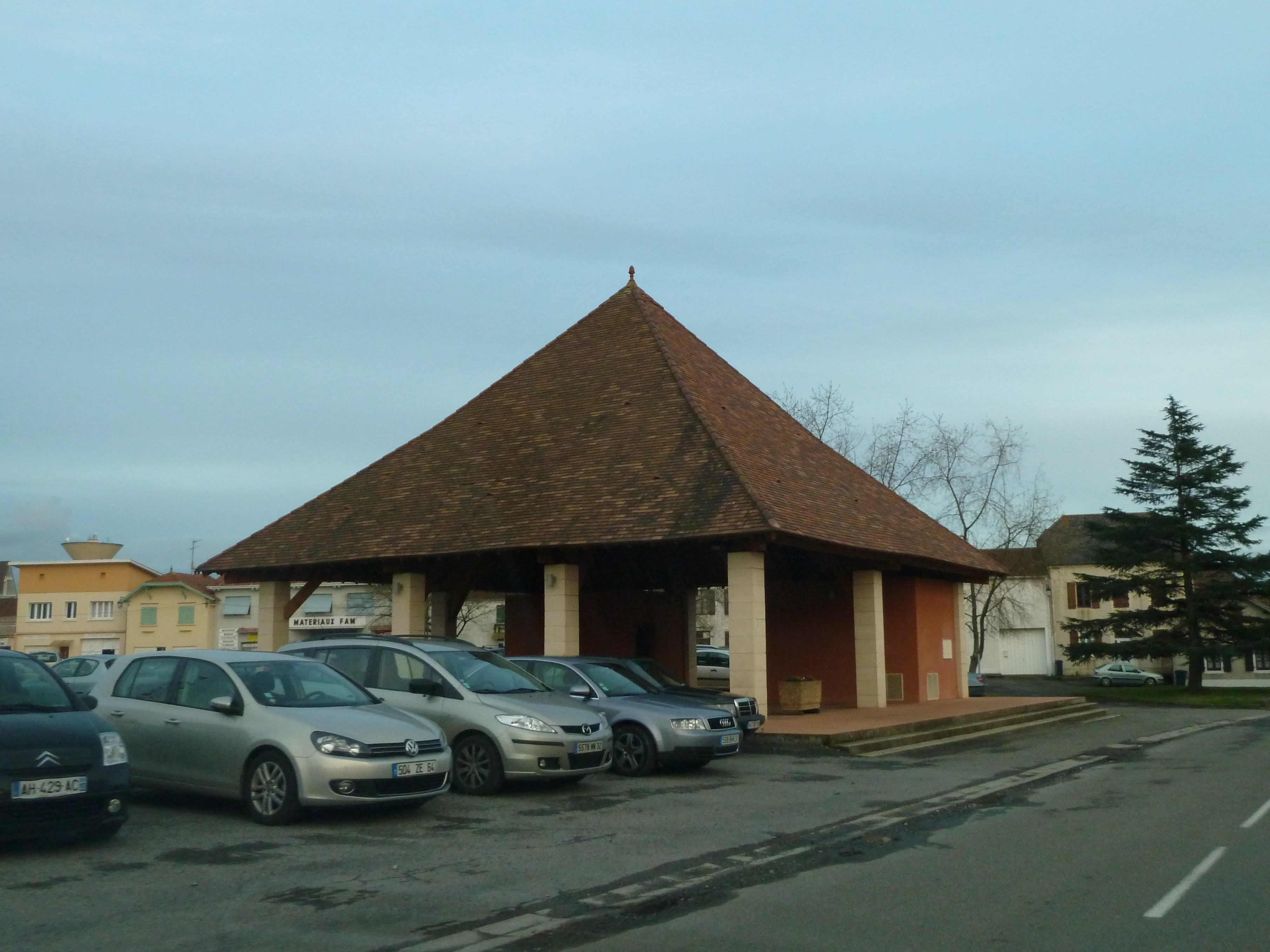 Arzacq-Arraziguet